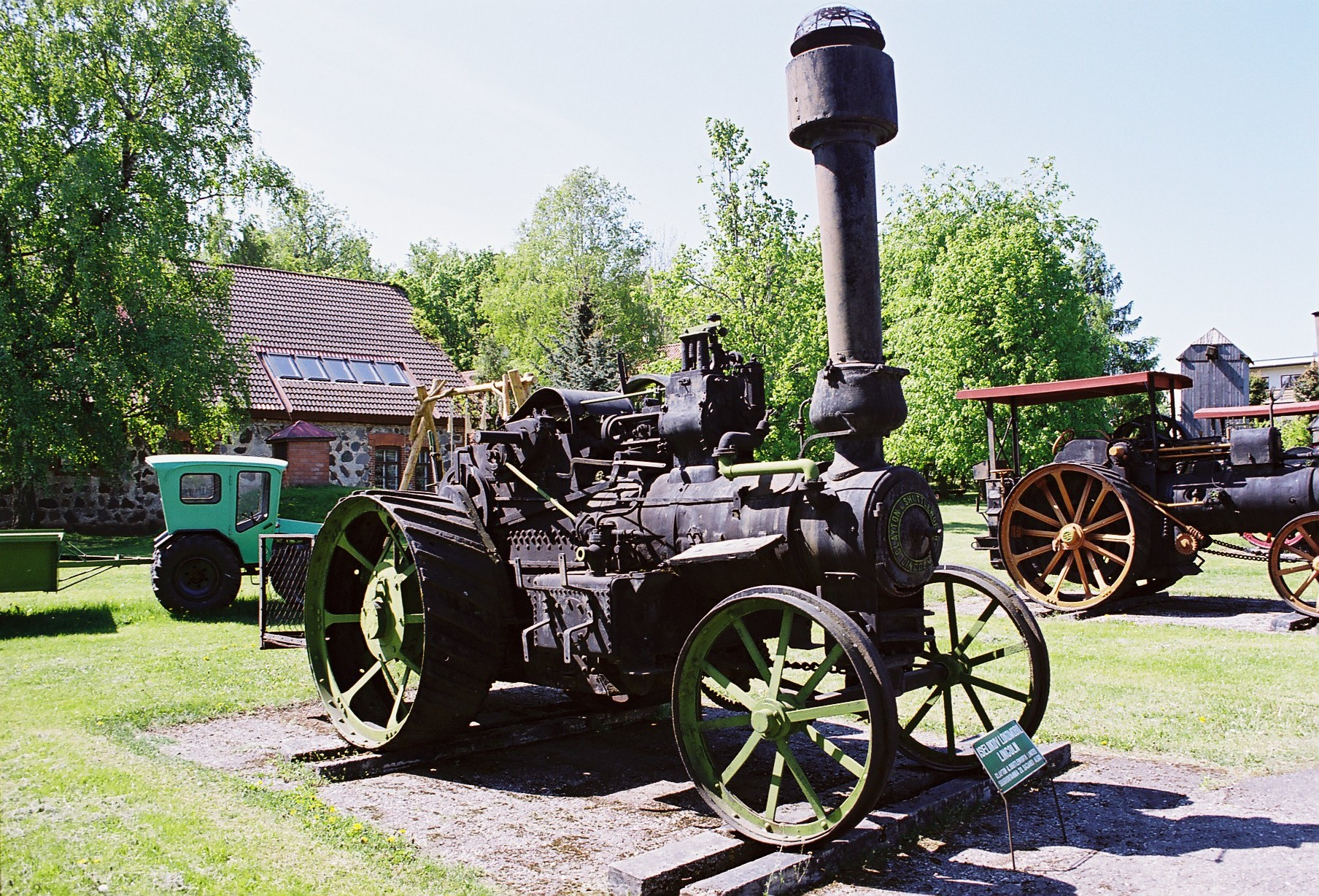 Iseliikuv lokomobiil Lincoln, 20 sajandi algul, Clayton & Shuttleworth